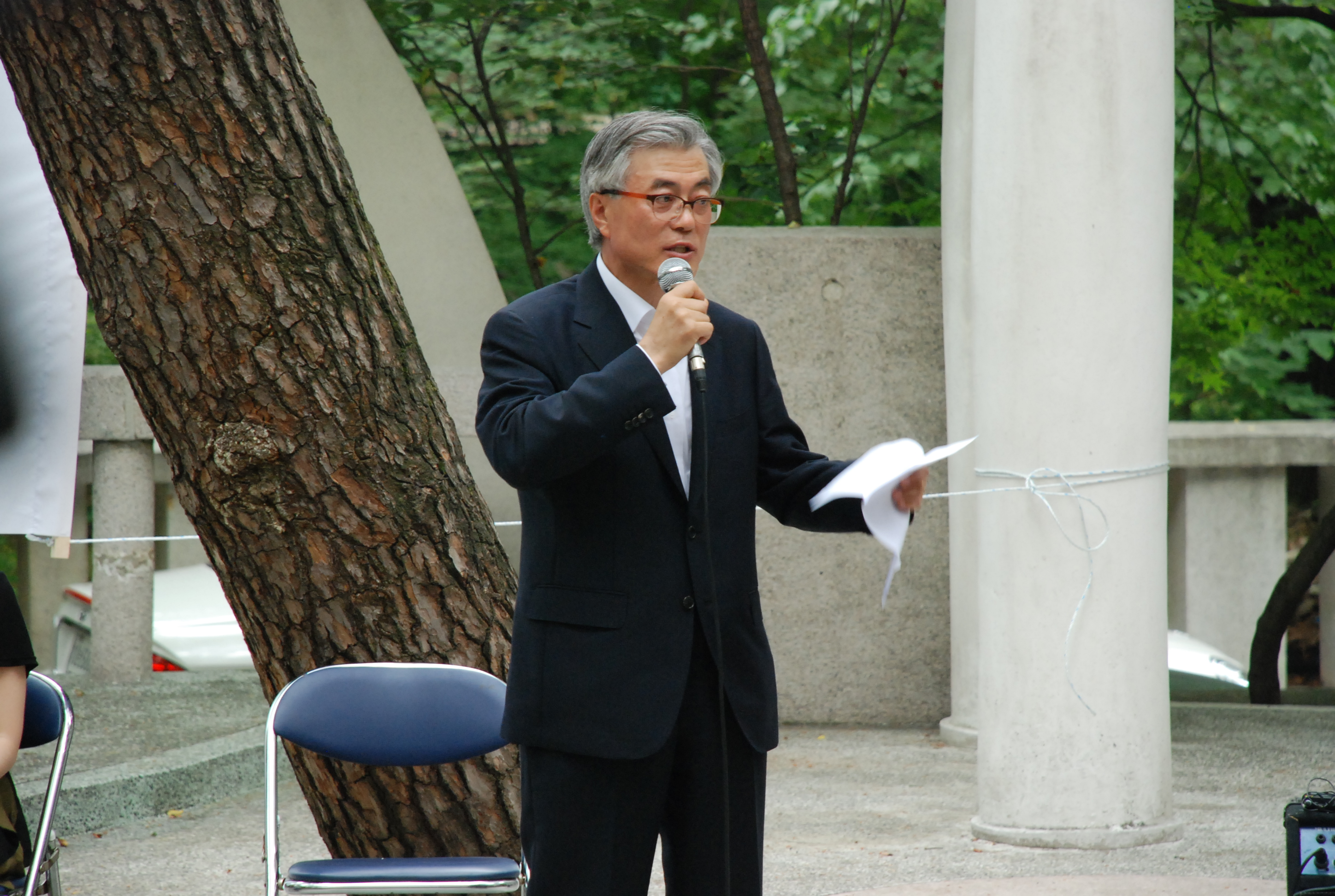 경희대 광장 토크